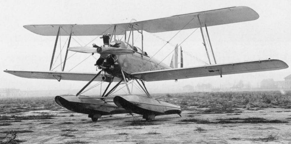 Idrovolante Caproni Ca.100 anfibia con motore Farina T.58